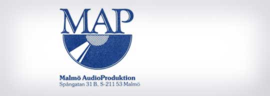 Logo, Malmö Audioproduktion